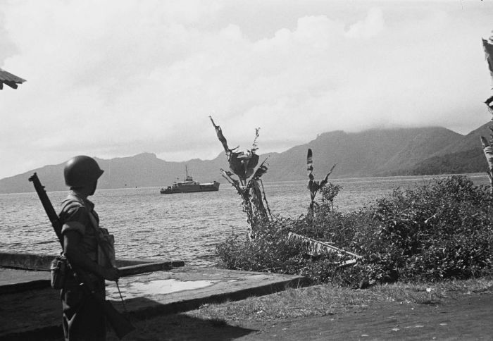 negatief. Militair met marineschip, bij Poelau Siaoe of in de baai van Tahoena